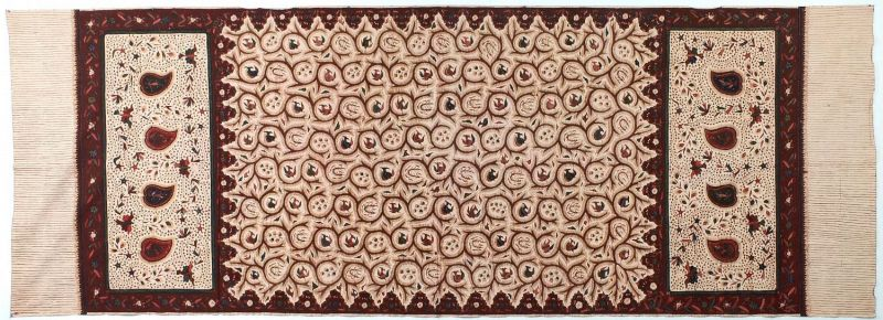 Wikkelrok. Gebatikte katoenen doek, bruine en rode kleuren domineren met vlinder-, bloem- en vogeltjesmotieven. Ook gebruikt om kinderen te dragen.. Gebatikte wikkelrok Unknown language: Kain panjang